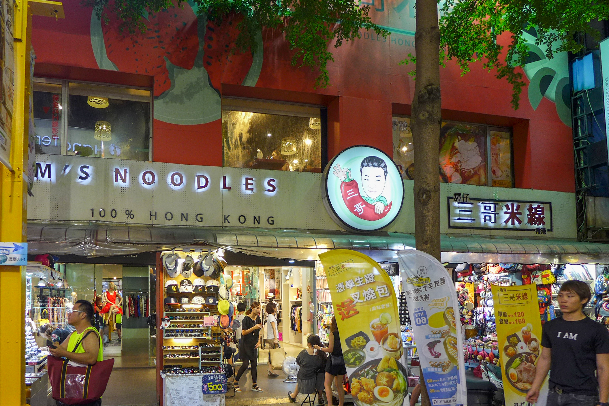 TamJai SamGor Mixian in Ximending